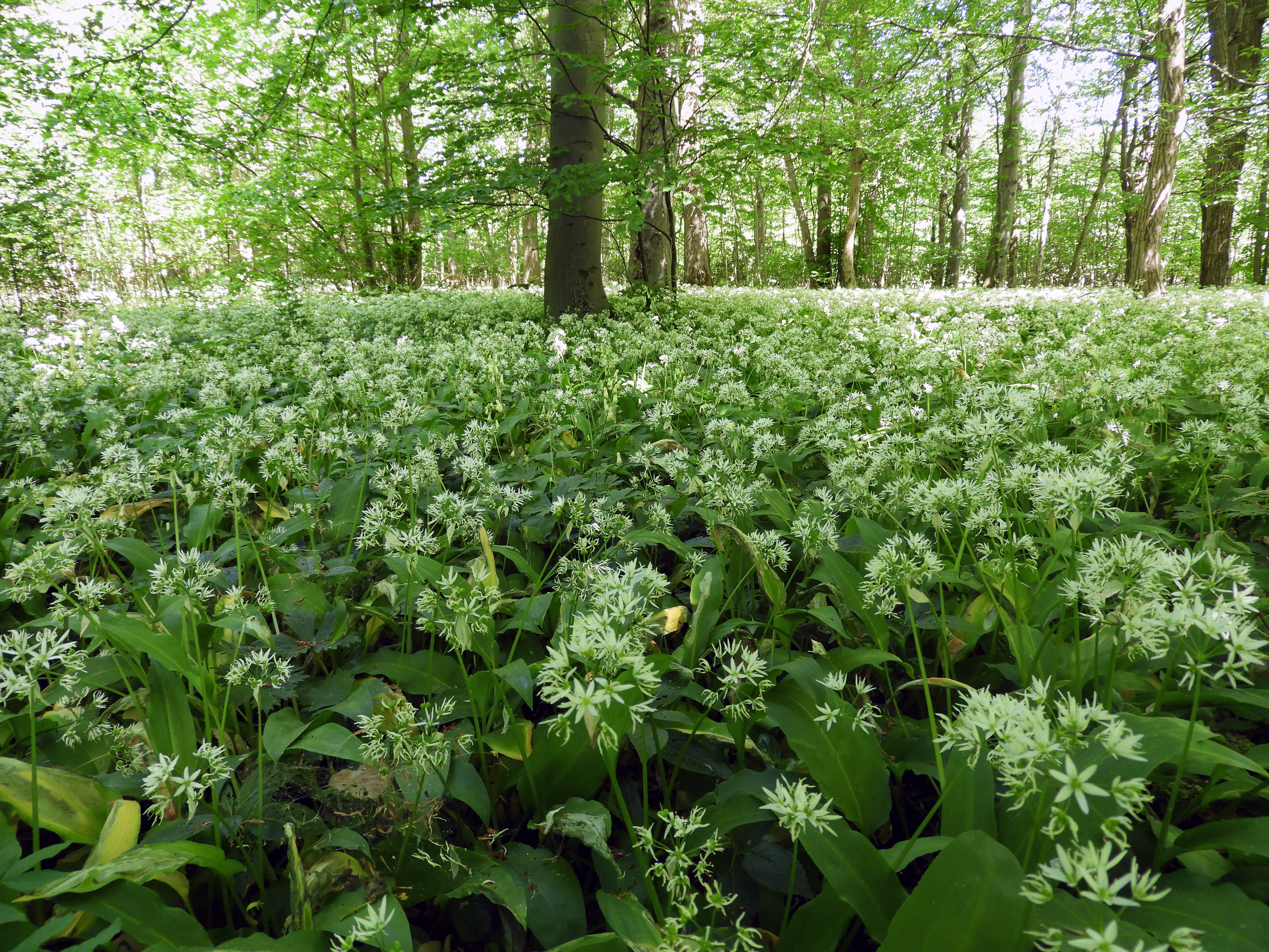 Bärlauchblüte auf der Plesse am Premiumwanderweg P 5. Das Gebiet liegt Geo-Naturpark Frau-Holle-Land und hat den Schutzstatus als Naturschutzgebiet "Plesse-Konstein" mit dem WDPA-ID 7051 und ist zugleich ein Teil vom FFH-Gebiet 4827-301 "Plesse-Konstein-Karnberg" und des Vogelschutzgebietes 4726-401 "Felsklippen im Werra-Meißner-Kreis".